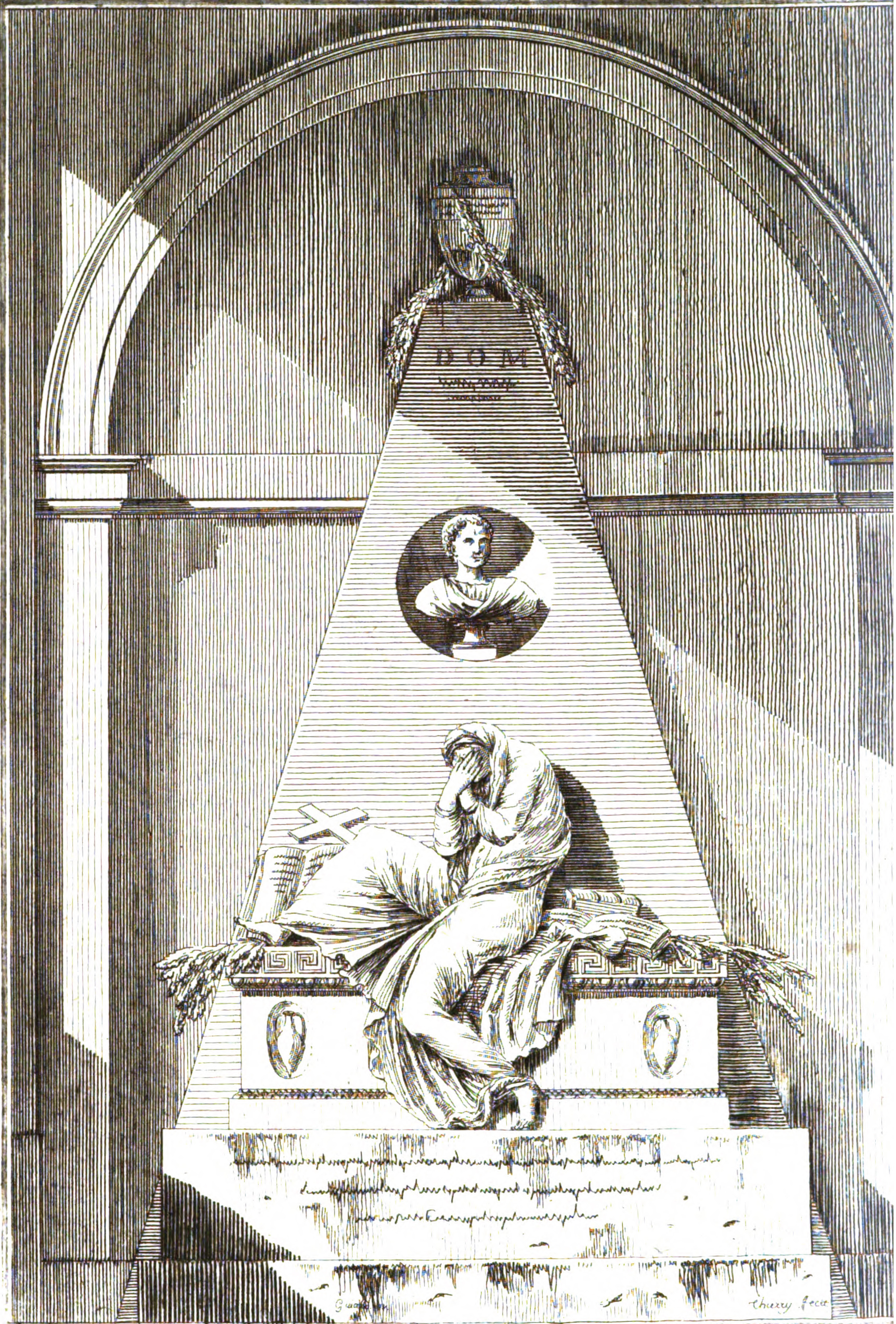 Planche tirée de Le Père Lachaise, ou Recueil de dessins au trait et dans leurs justes proportions des principaux monumens de ce cimetière.